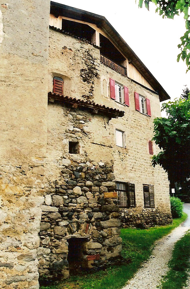 Turm in Tirol, heute Pfarrwidum, 1335 an die Herren an der Gassen als landesfürstliches Lehen verliehen